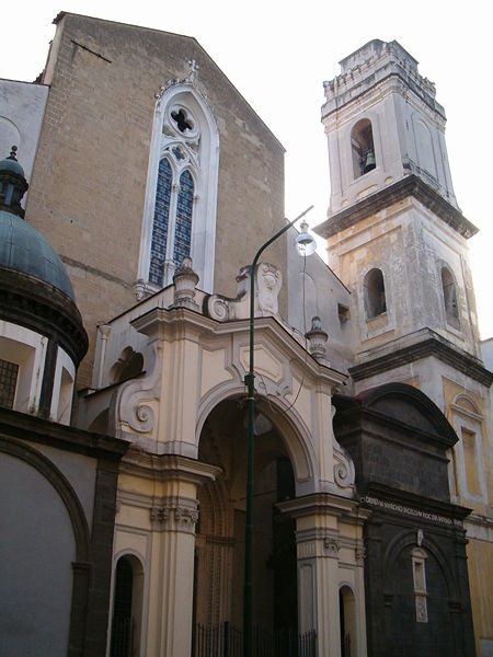 Фасад ц. Сан-Доменико-Маджоре (Неаполь)